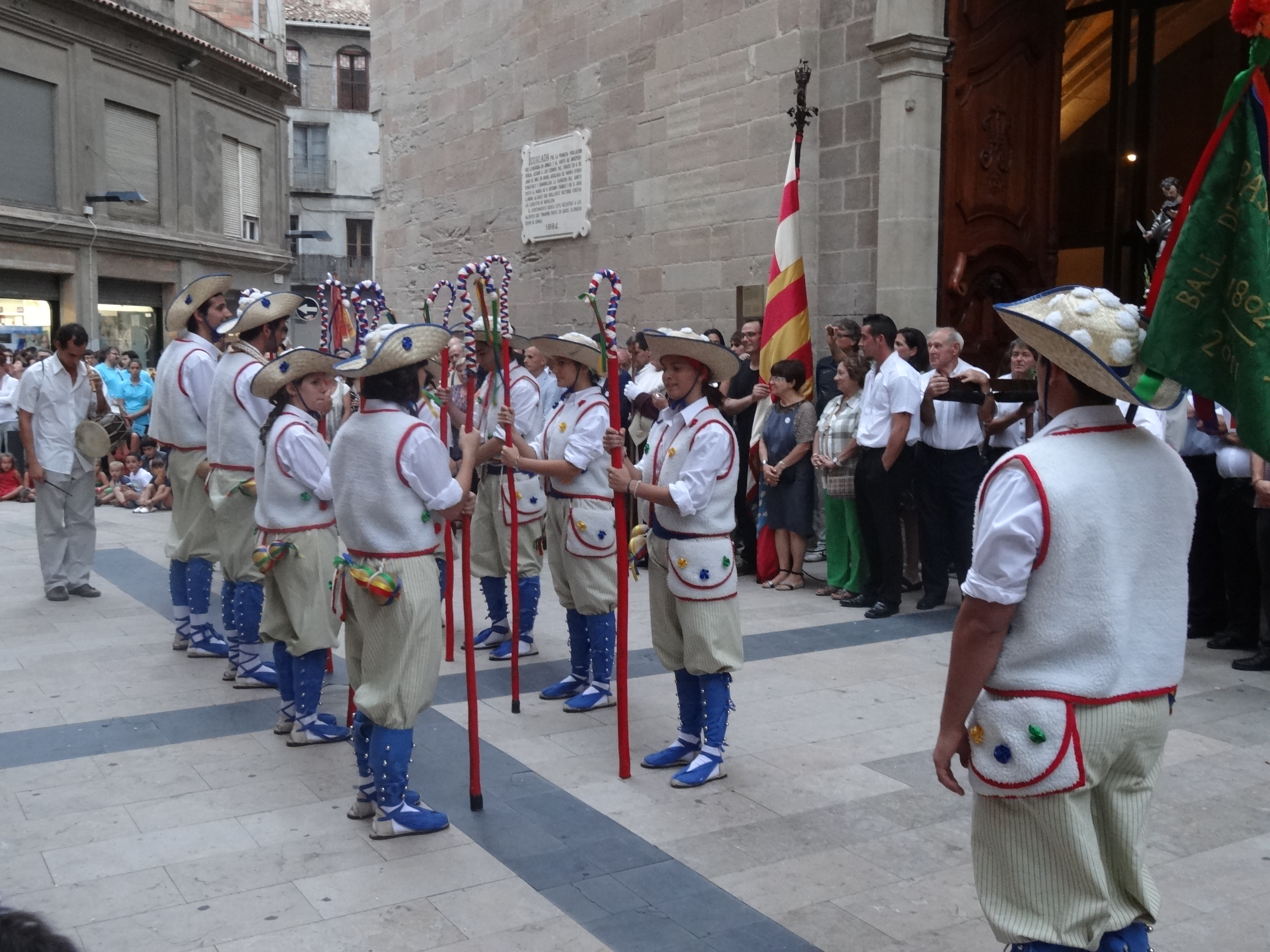 Festa Major d'Igualada 2013. Processó de Sant Bartomeu. Ball de Pastorets d'Igualada